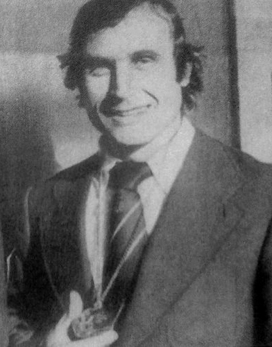 Gheorghe Danielov